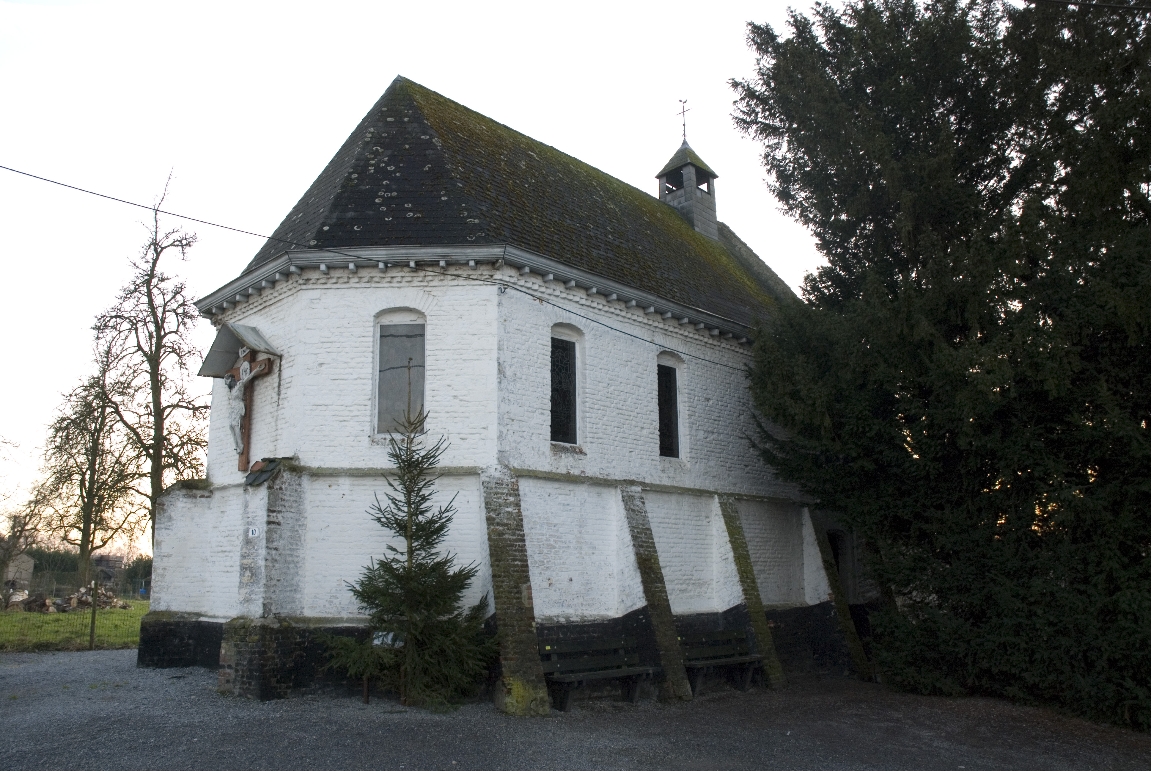 Kapel van Oetersloven in Wellen, België